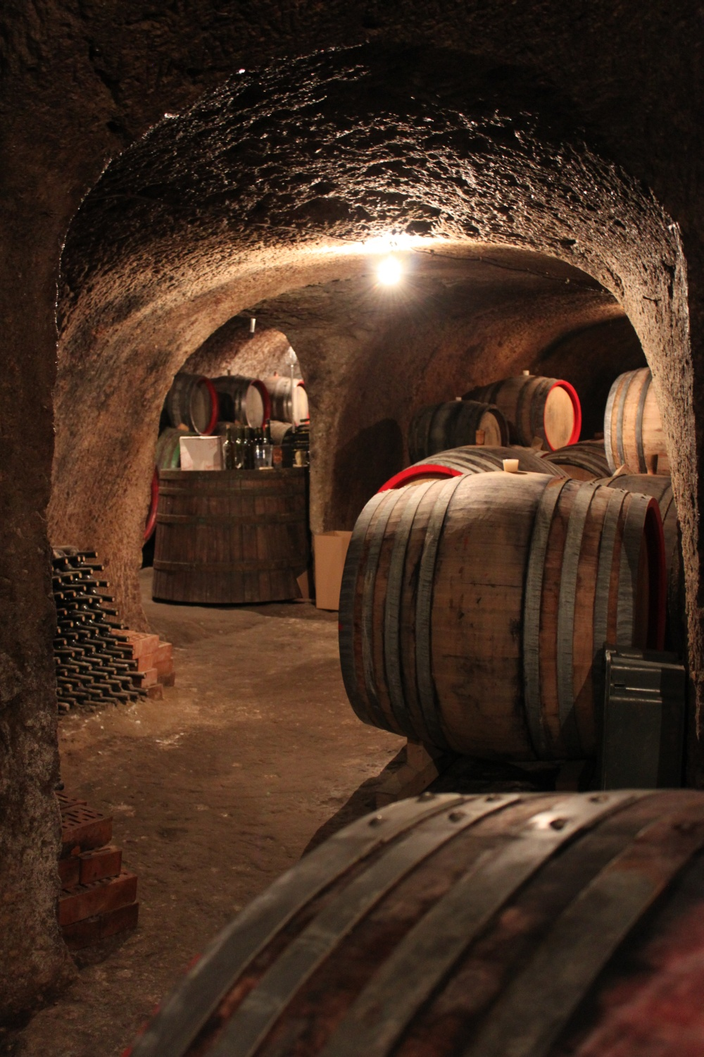 Tufába vájt pince Szomolyán (egri borvidék)